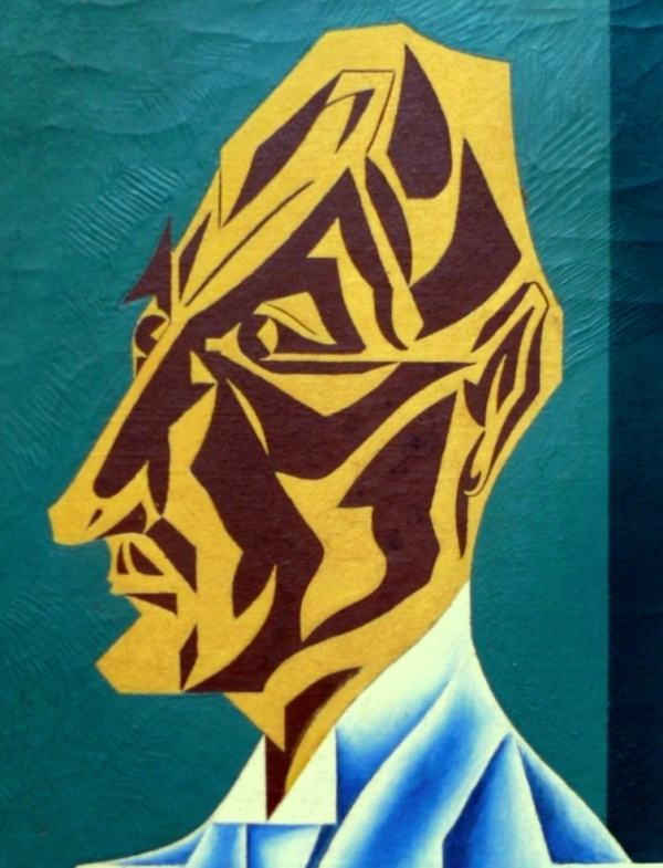 Paul Fuhrmann 1893 -1952. Studium von 1910 bis 1915 bei Professor Soerensen Kopenhagen, danach an der Schule des Kunstgewerbemuseum bei Professor Emil Orlik in Berlin. Er hatte Kontakt zu der Gruppe der " Zeitgemäßen", er veröffentlichte auch in der Zeitschrift "Sturm" und war Mitglied der Berliner Künstlergruppe " Die Abstrakten".